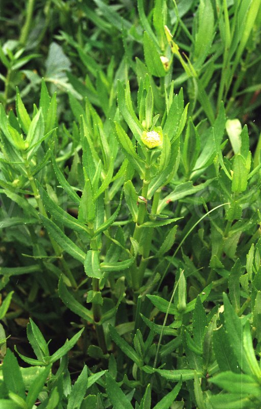 অসমীয়া: হেলচী